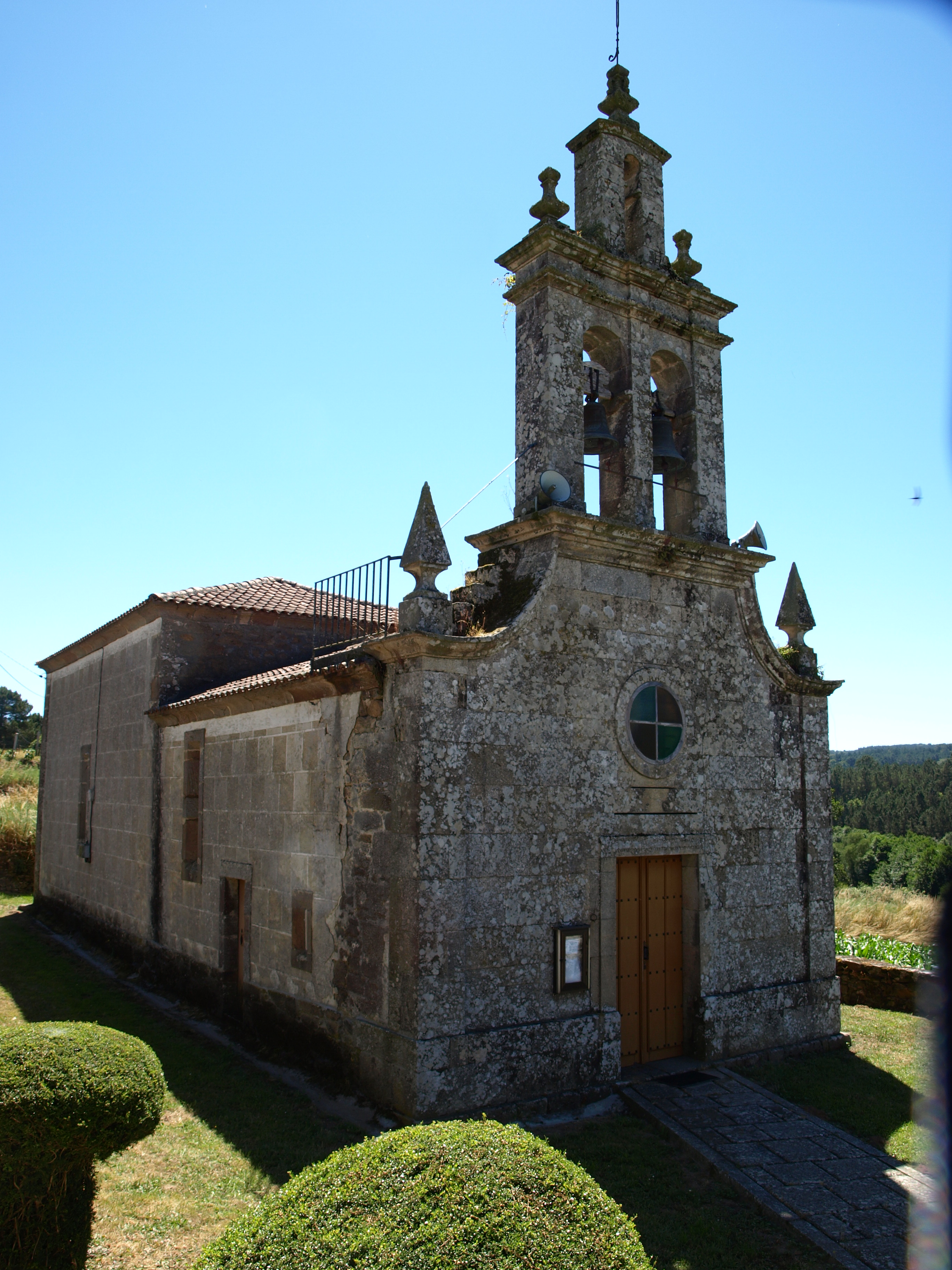 Igrexa da Carballeira, parroquial do Mato (Chantada)